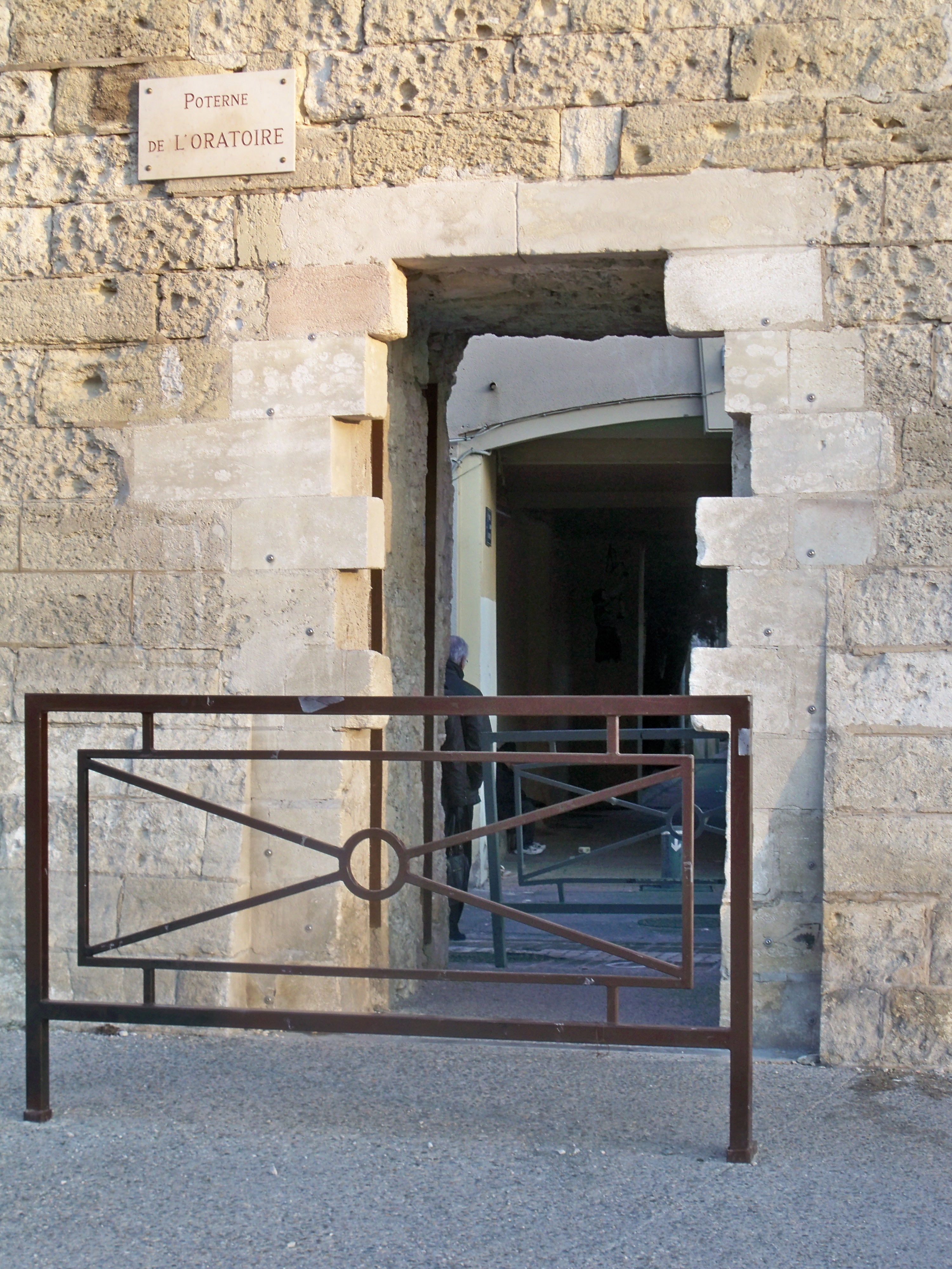 Poterne de l'Oratoire, Place de l'Oulle à Avignon, Vaucluse, France